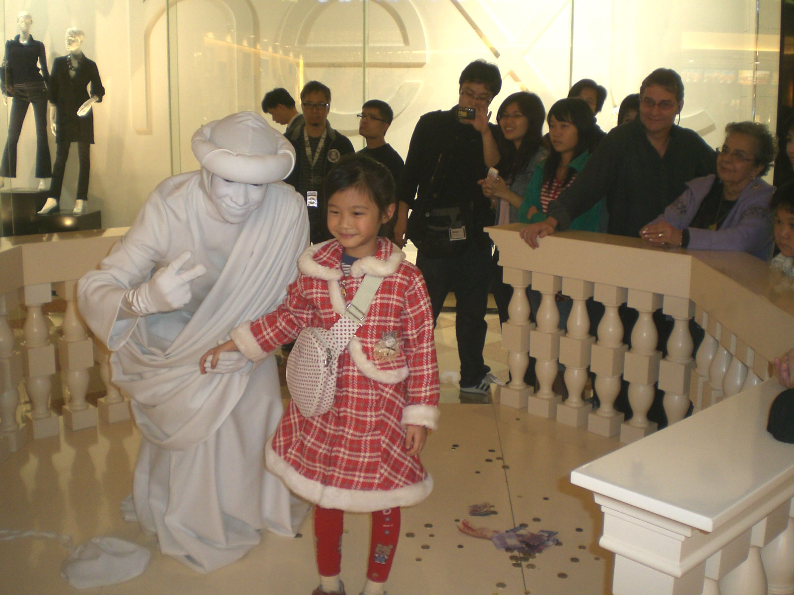 澳門威尼斯人渡假村酒店街頭藝術家活動雕像Living statue